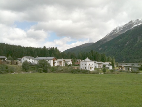 Chapella, zu S-chanf gehörig